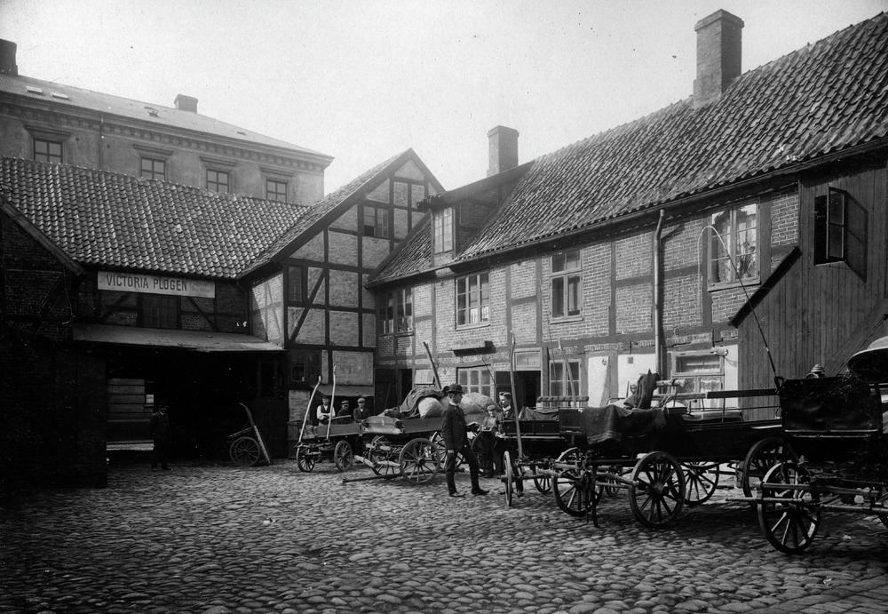 Innergården på Lückanderska gården vid Kullagatan i Helsingborg 1907.